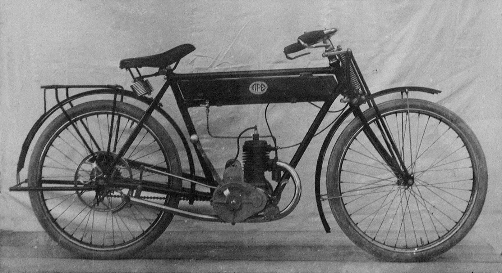 Una rara immagine della motoleggera APE